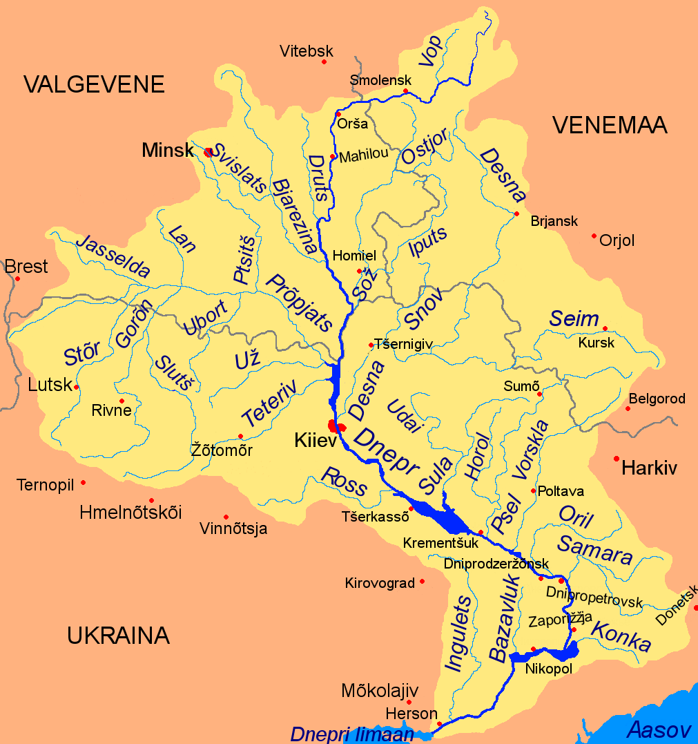 Dnepri jõgi